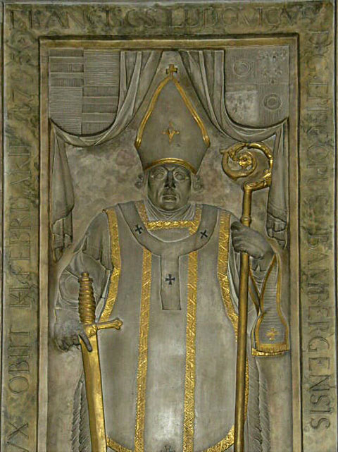 Darstellung des Fürstbischofs Franz Ludwig von Erthal auf seinem Epitaph im Würzburger Dom